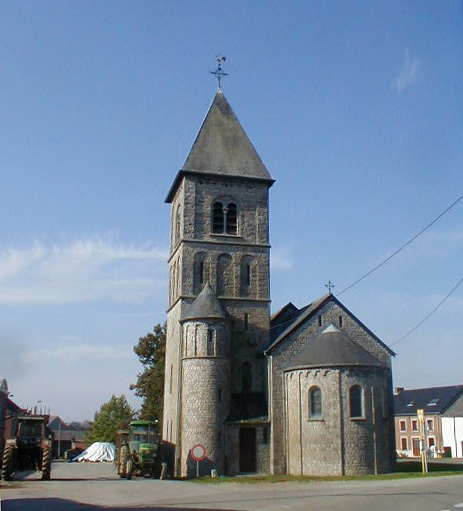 Walon: eglijhe di Vådcêye (poirtrait saetchî pa L. Mahin)